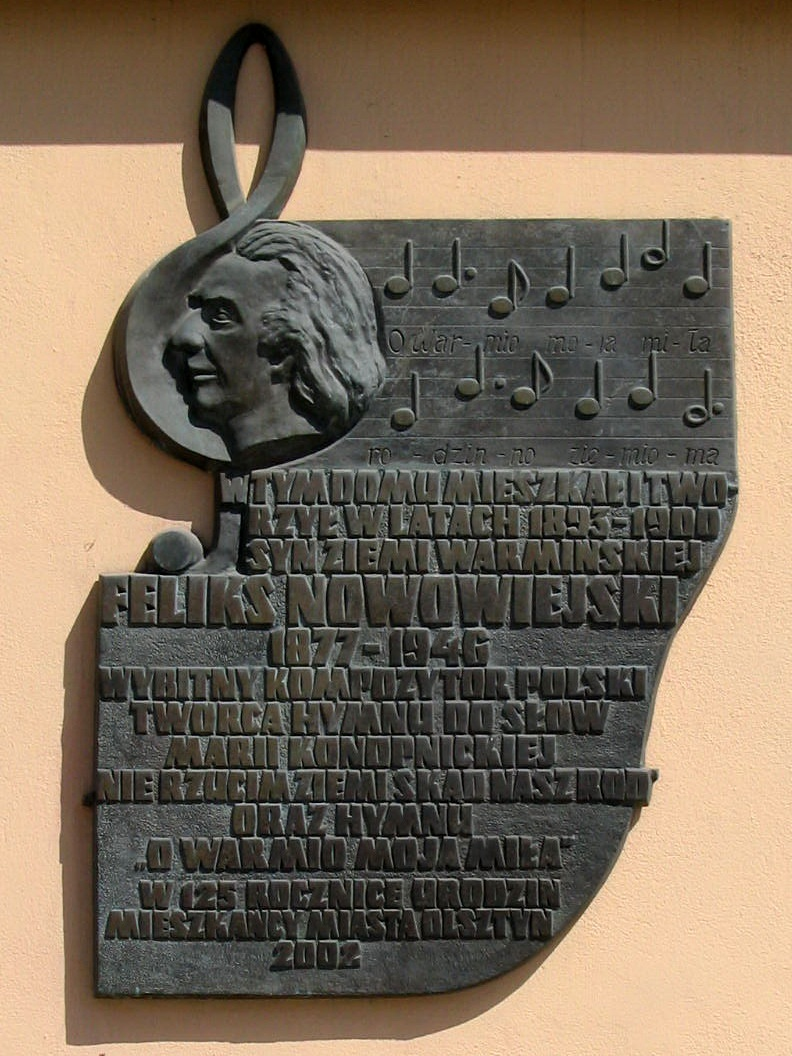 Tablica pamiątkowa poświęcona Feliksowi Nowowiejskiemu w Olsztynie